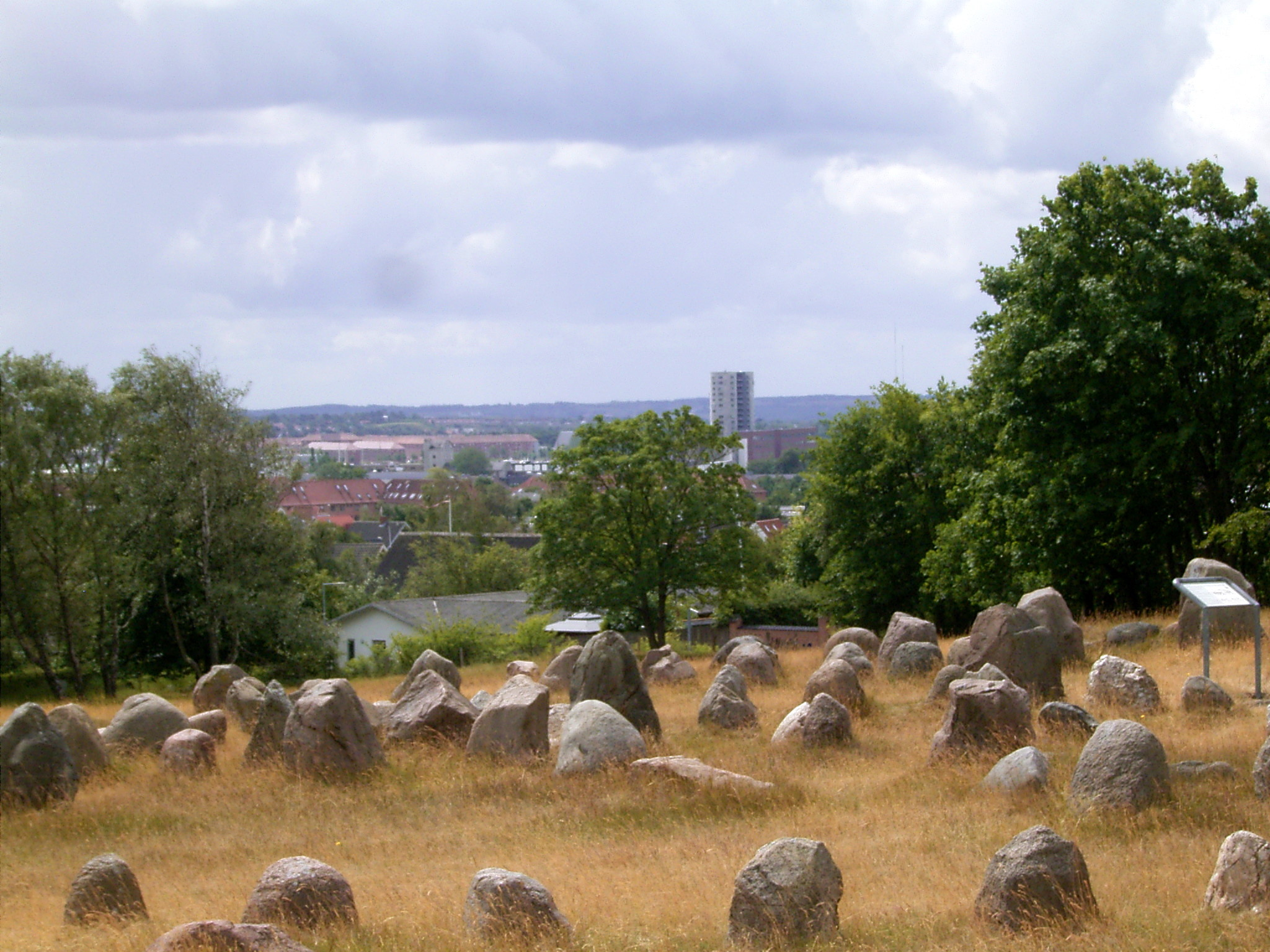 Lindholm Høje, Aalborg, Denmark